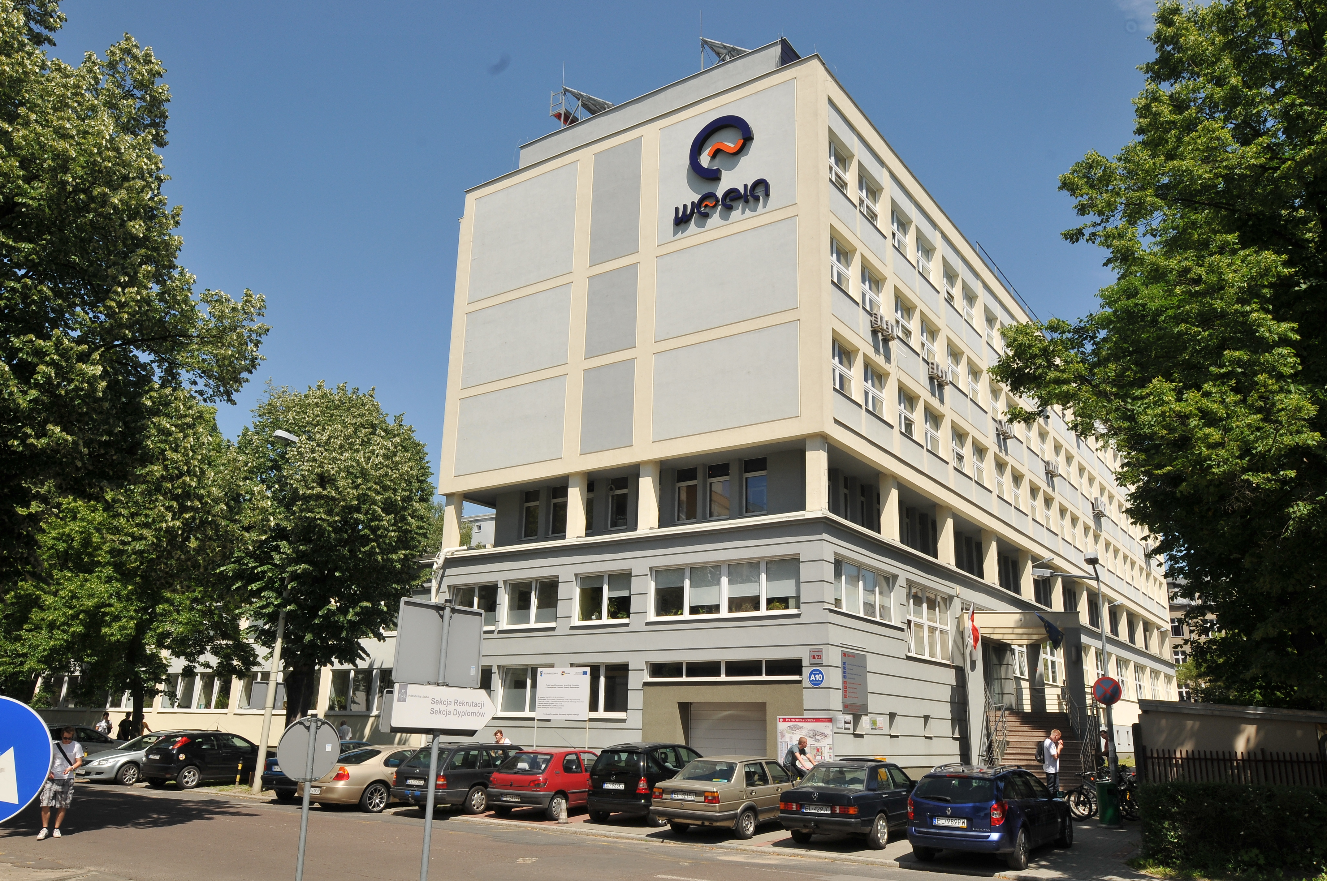 Politechnika Łódzka, Wydział Elektrotechniki, Elektrotechniki, Informatyki i Automatyki